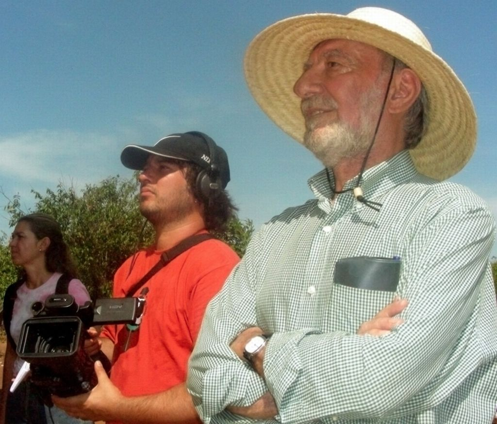 (portuguese) O jornalista e ambientalista brasileiro Washington Novaes em visita a aldeia indígena